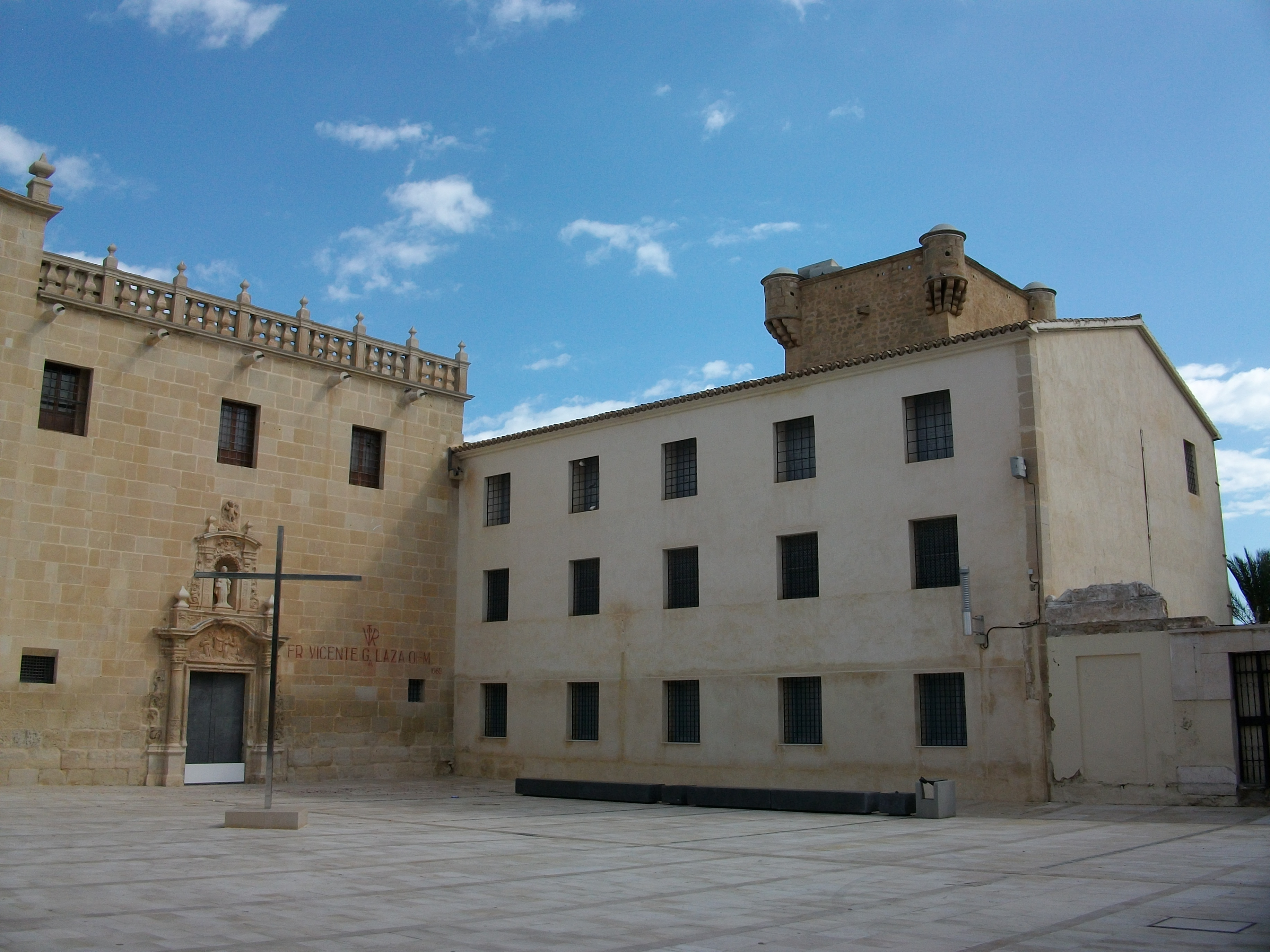 Torre defensiva i plaça de Santa Faç, Alacant.